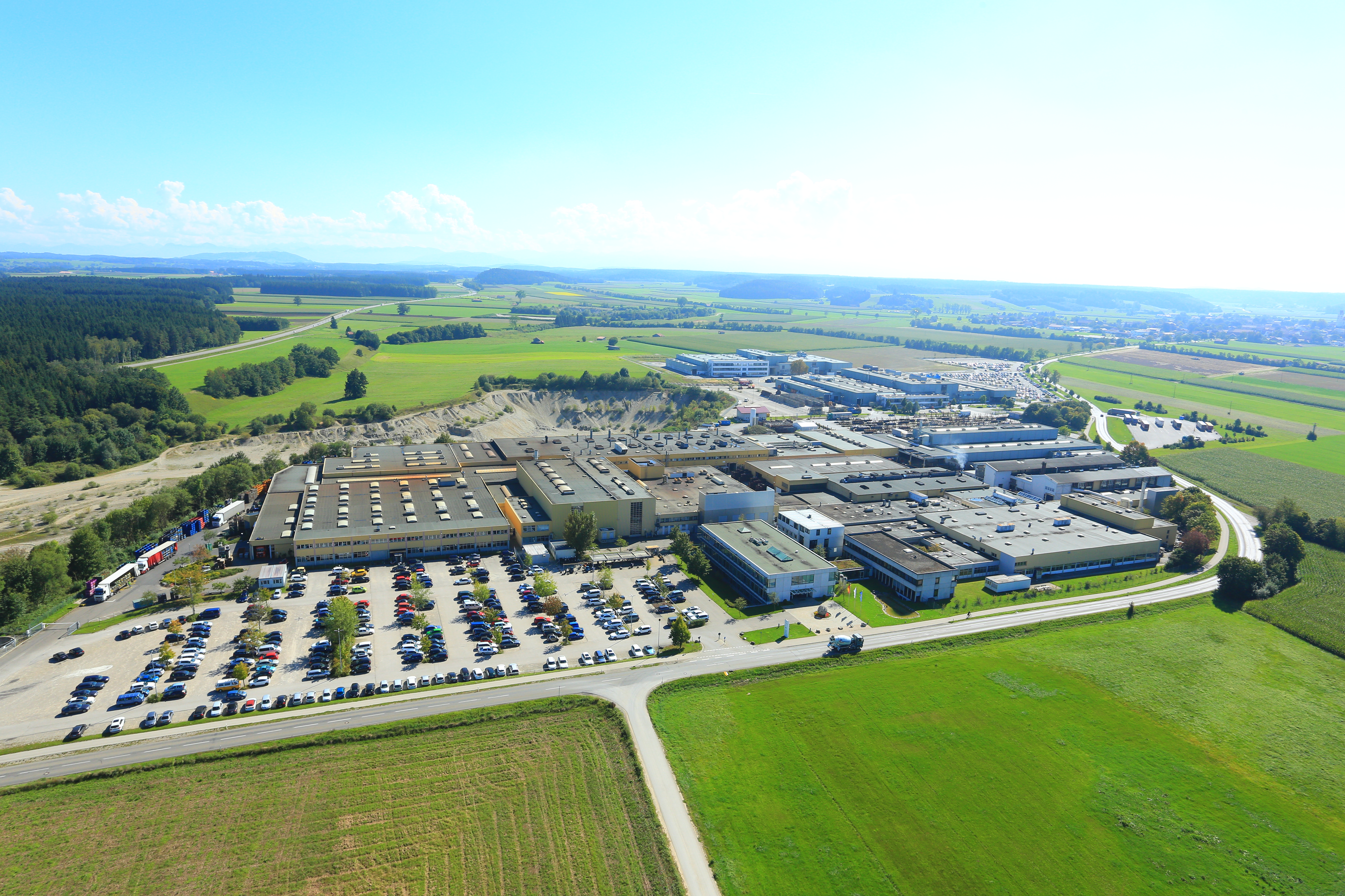 Stammwerk Denklingen der Hirschvogel Automotive Group